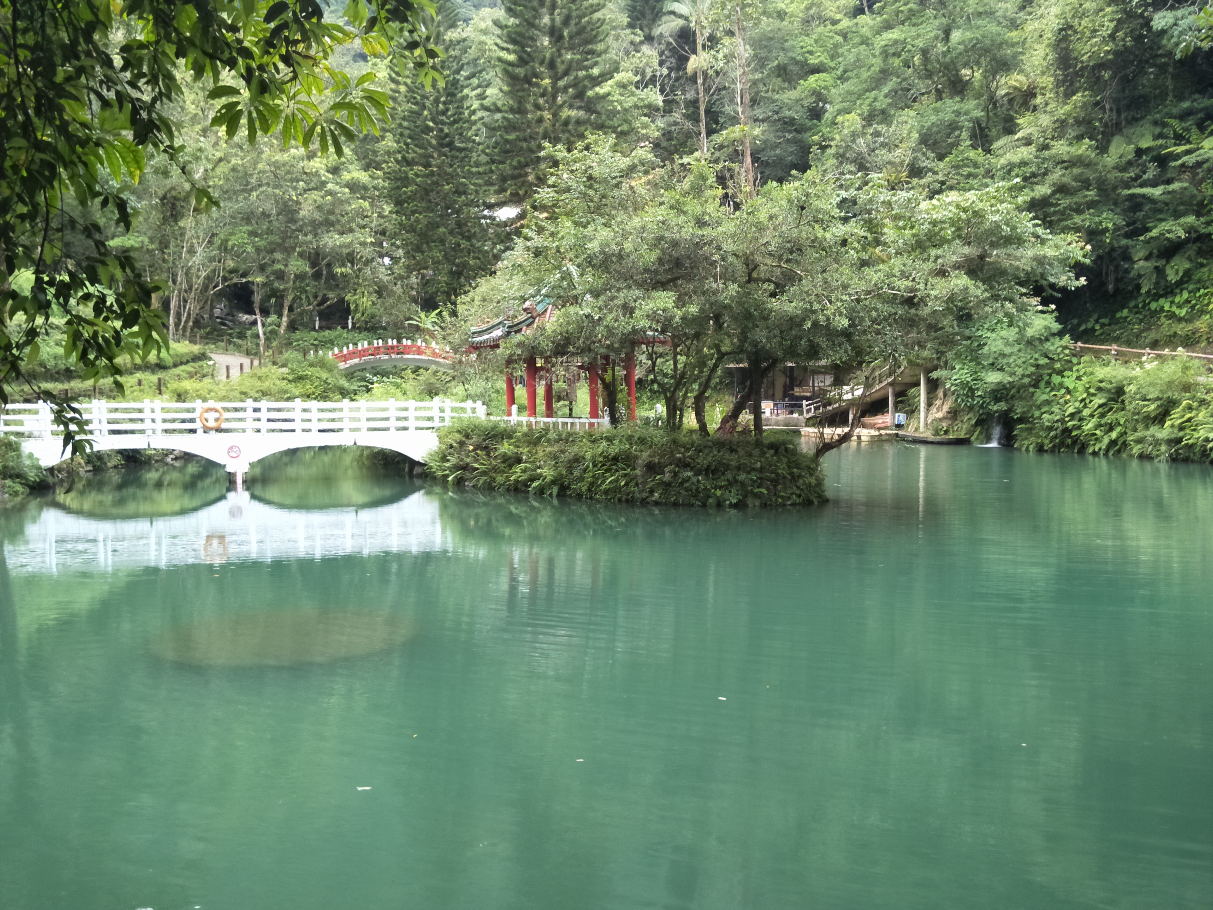 拍攝時間:2020年7月2日，拍攝地點:烏來區雲仙樂園，拍攝工具:智慧型手機